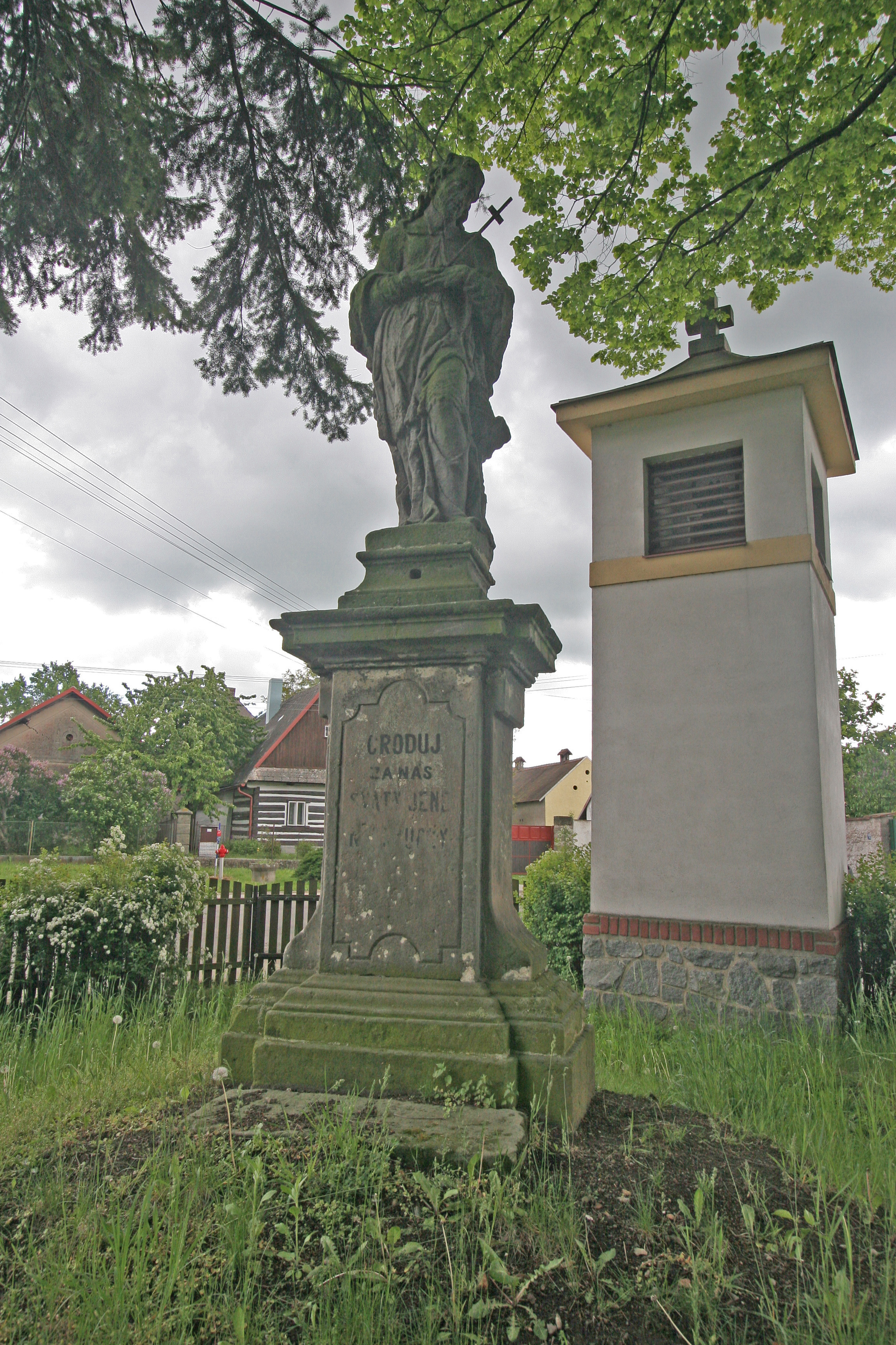 Socha sv. Jana Nepomuckého (Nabočany), Nabočany